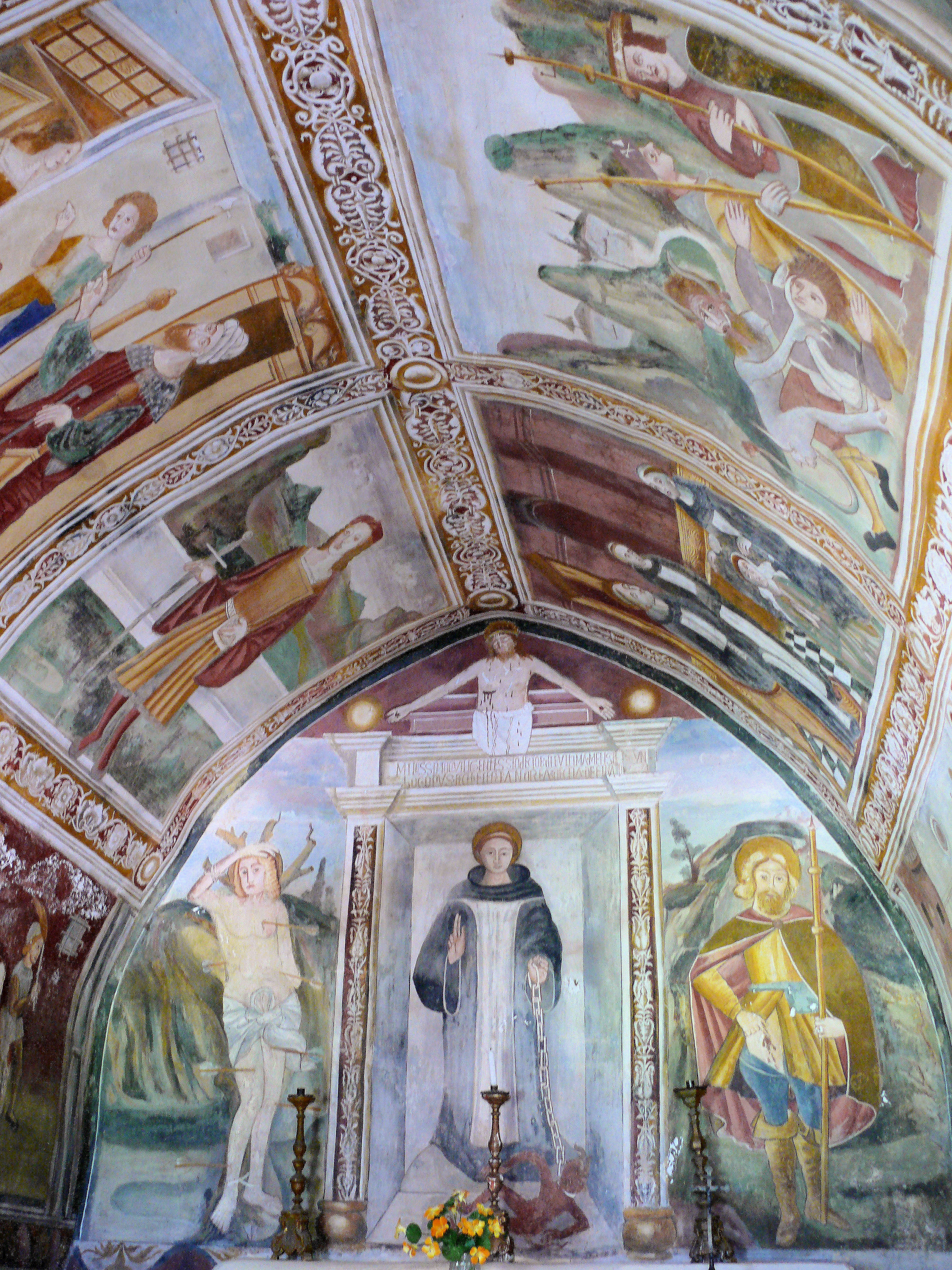 Roure - Chapelle Saint-Sébastien - Décoration intérieure